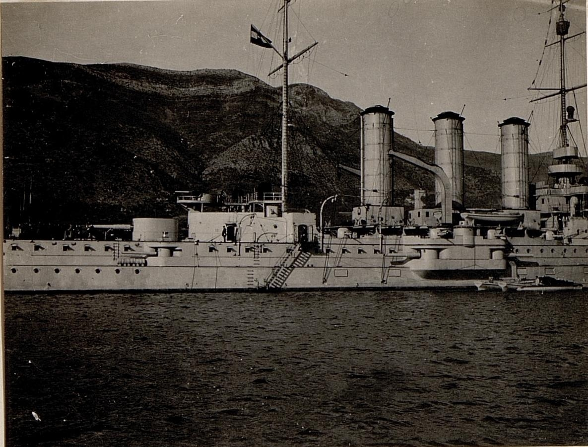 Besichtigung des Kriegsschiffes S.M.S. St. GEORG. Aufgenommen in den Gewässern vor Castelnuovo am 23. Februar 1916.